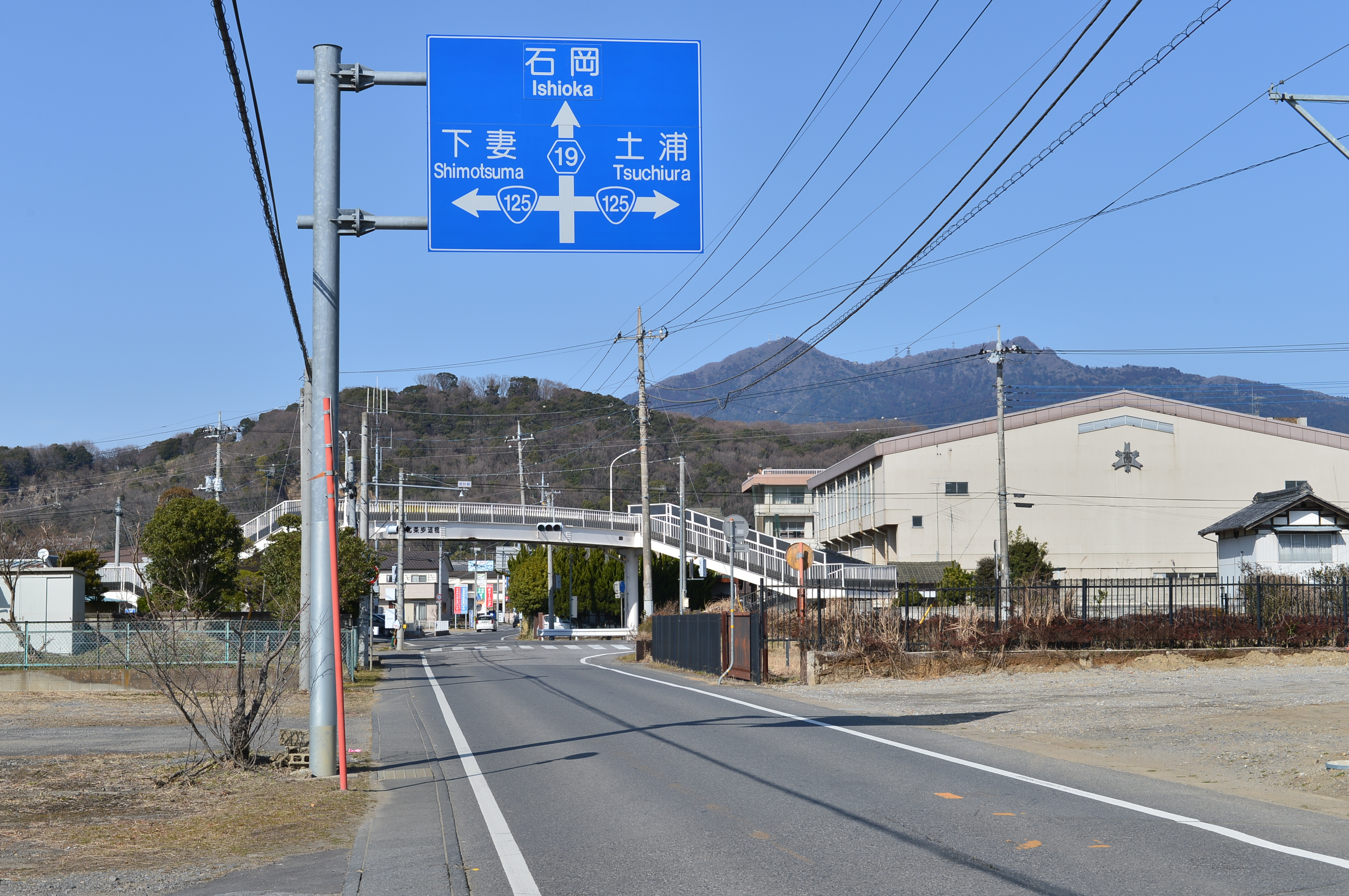 茨城県道19号取手つくば線（つくば市の北条歩道橋前）